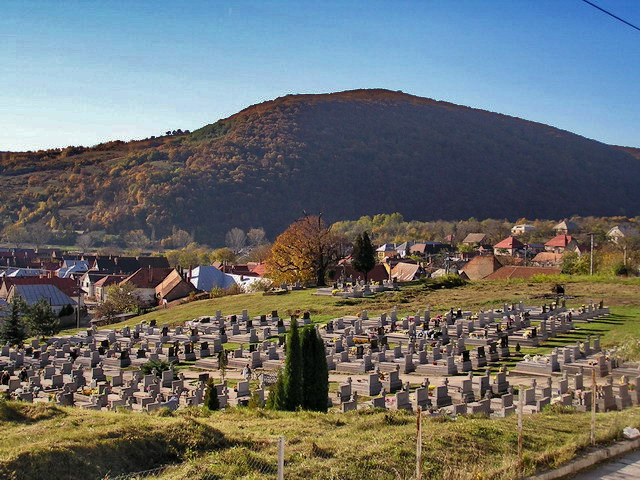 Hradova 466,1 m above sea level, Kosice, Slovakia